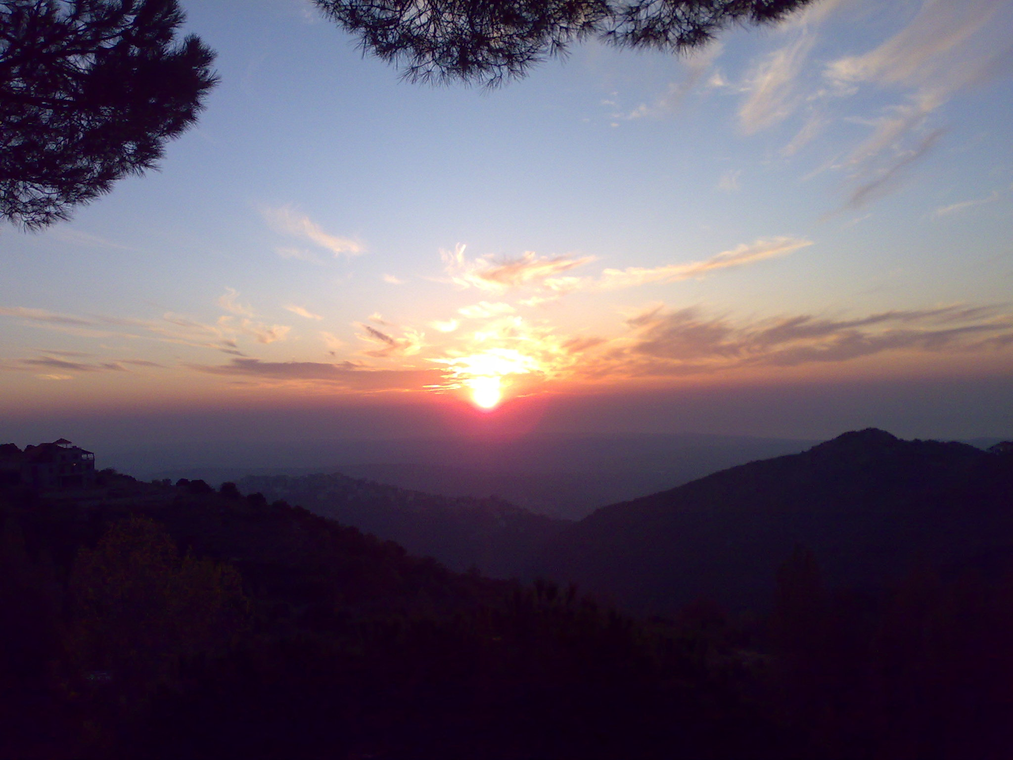 sunset view from Maghareek in Jbaa - Nov 09